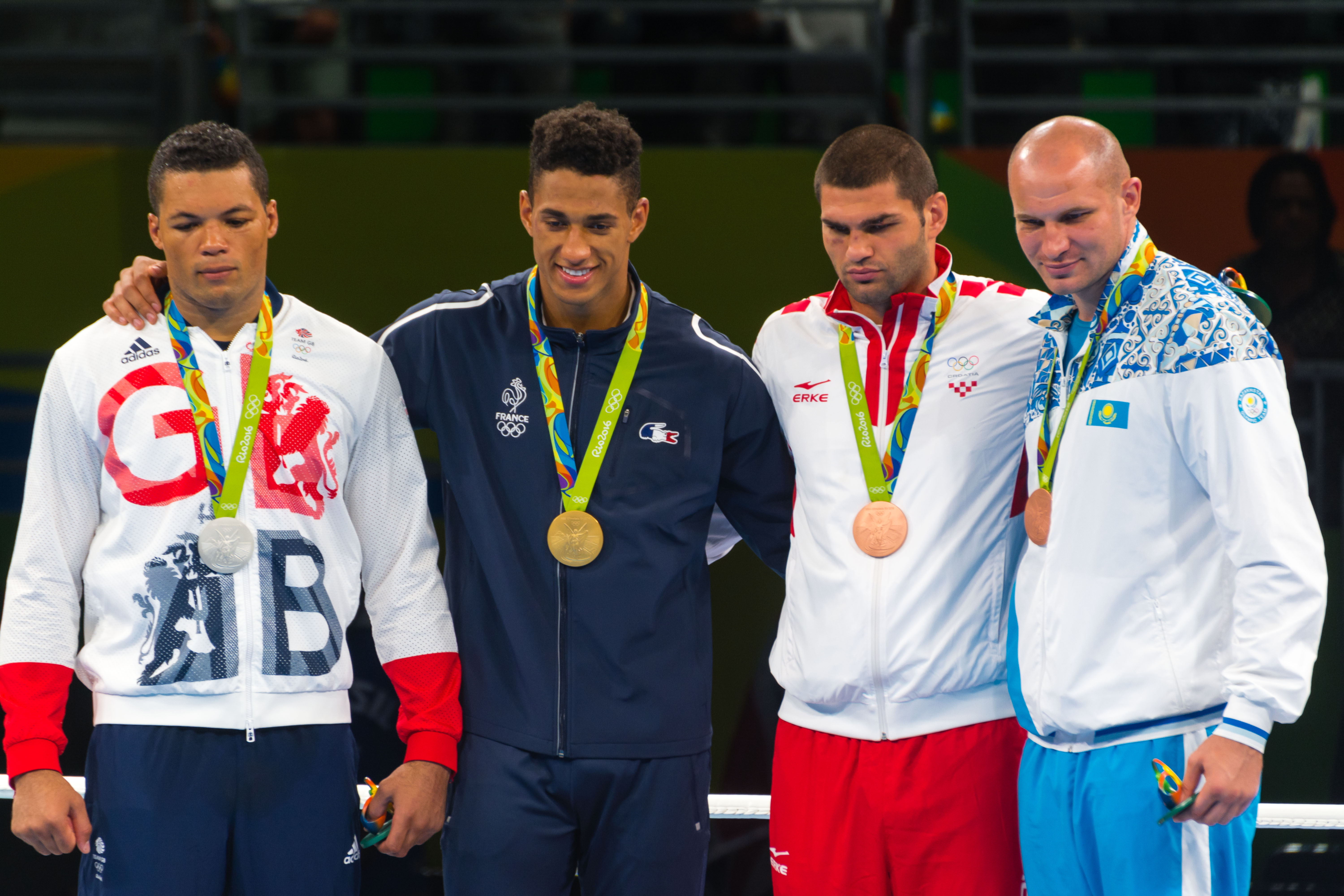 Pódio da categoria peso superpesado acima de 91kg masculino, Jogos Olímpicos Rio 2016. Ouro: Tony Victor James Yoka/FRA. Prata: Joe Joyce/GBR. Bronzes: Filip Hrgovic/CRO e Ivan Dychko/KAZ.